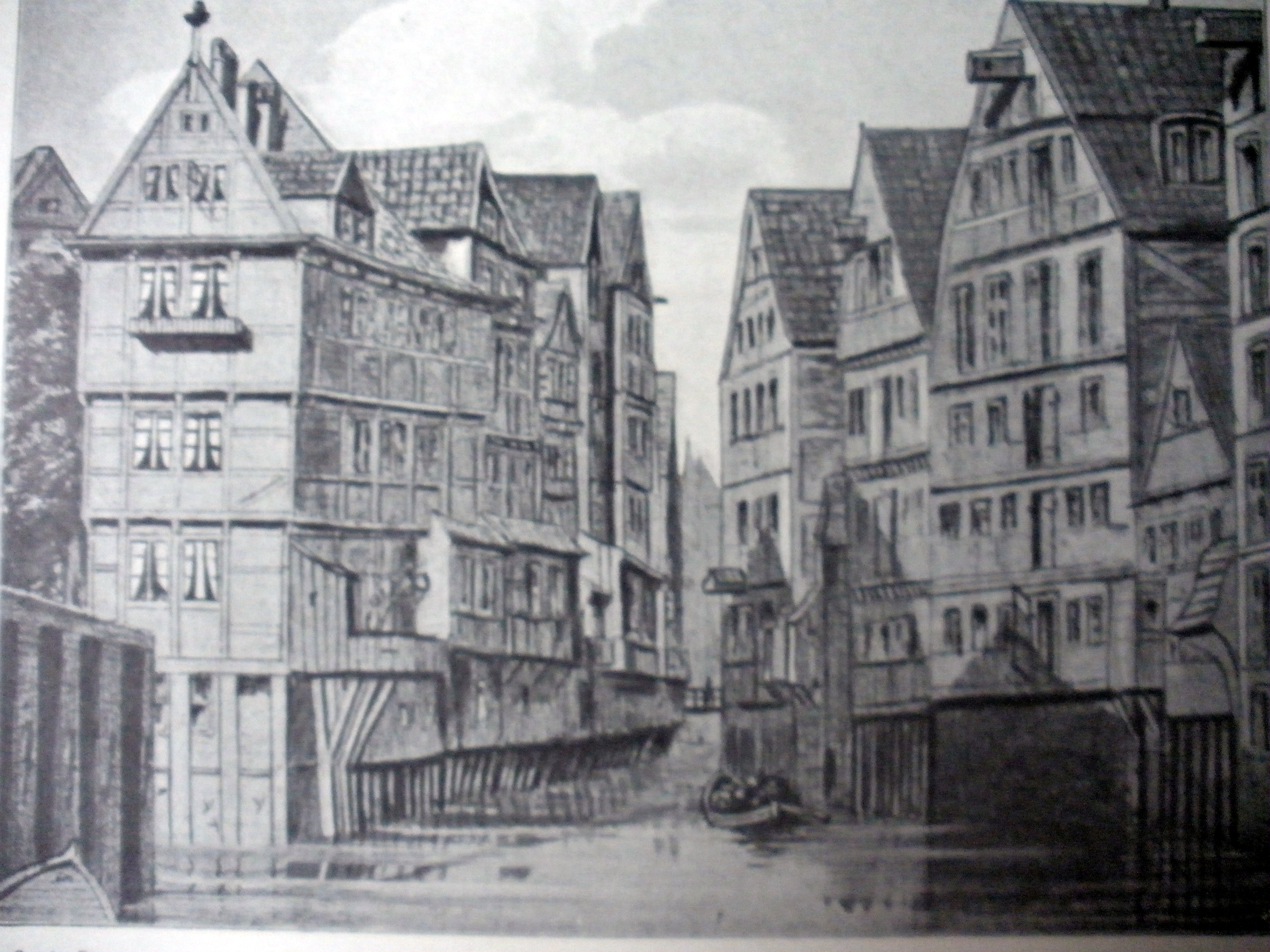 Reichenstraßenfleet, links Häuser der Kleinen Reichenstraße, rechts Häuser des Schopenstehls. Der Reichenstraßenfleet war ursprünglich ein Mündungsarm der Bille in die Alster, im 9. Jahrhundert lag hier der erste Hamburger Hafen. Um 1880 wurde das Fleet zugeschüttet und bebaut. Der Speicher rechts im Bild steht heute noch. Der Verbindungskanal links ist zugeschüttet.